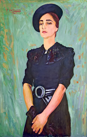 Петар Добровић, портерт Олге Добровић, 1938. Извор.